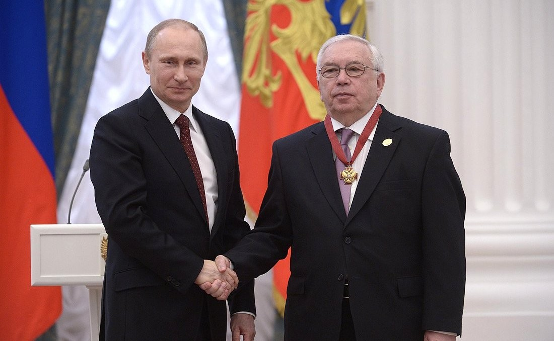 Вручение государственных наград Российской Федерации. Президент Общероссийской общественной организации «Паралимпийский комитет России» Владимир Лукин награждён орденом «За заслуги перед Отечеством» III cтепени.